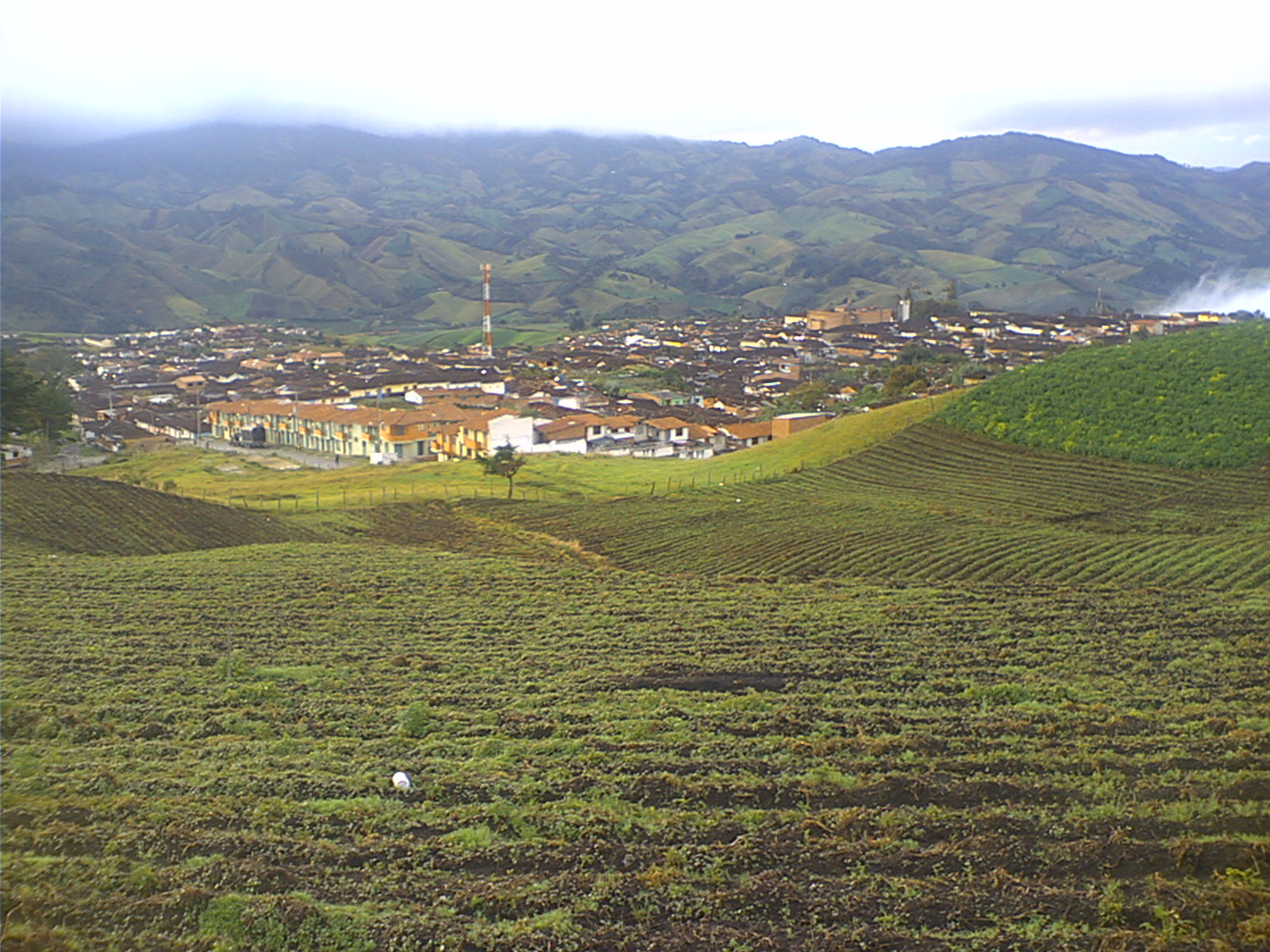 Panorámica desde la cincunvalar septiembre 2006